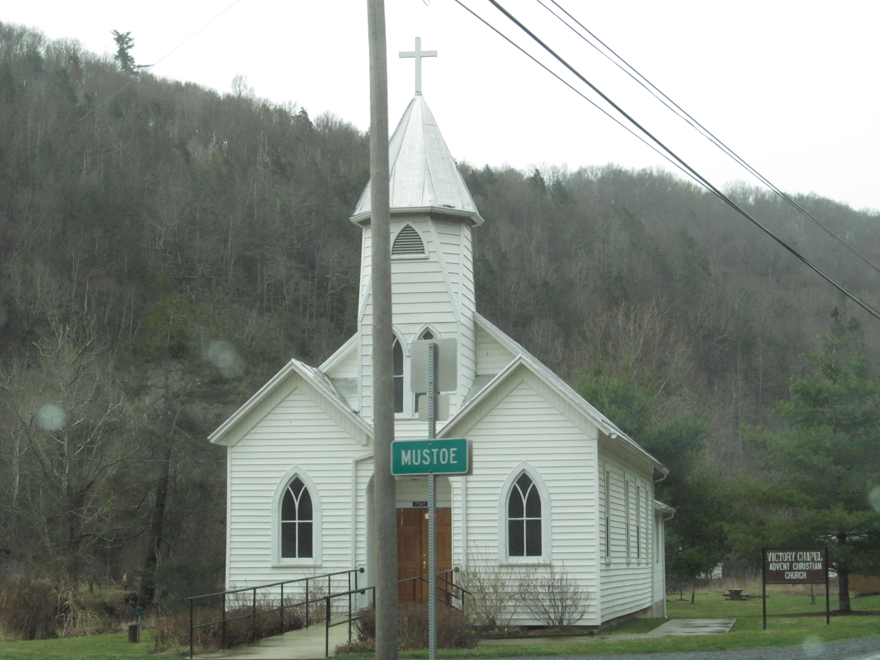 US Route 220 - Virginia